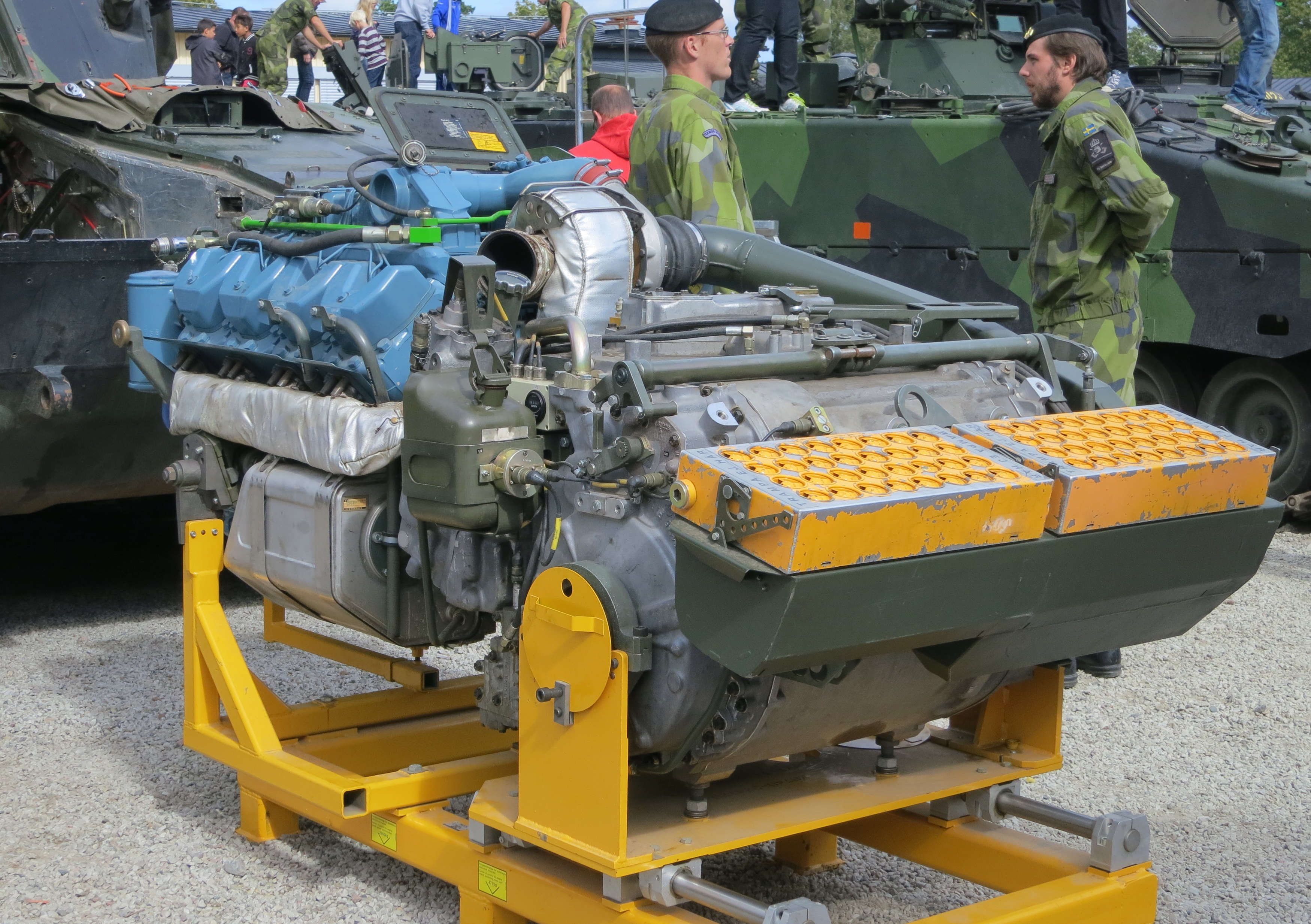 Stridsfordon 90 Motorpaket